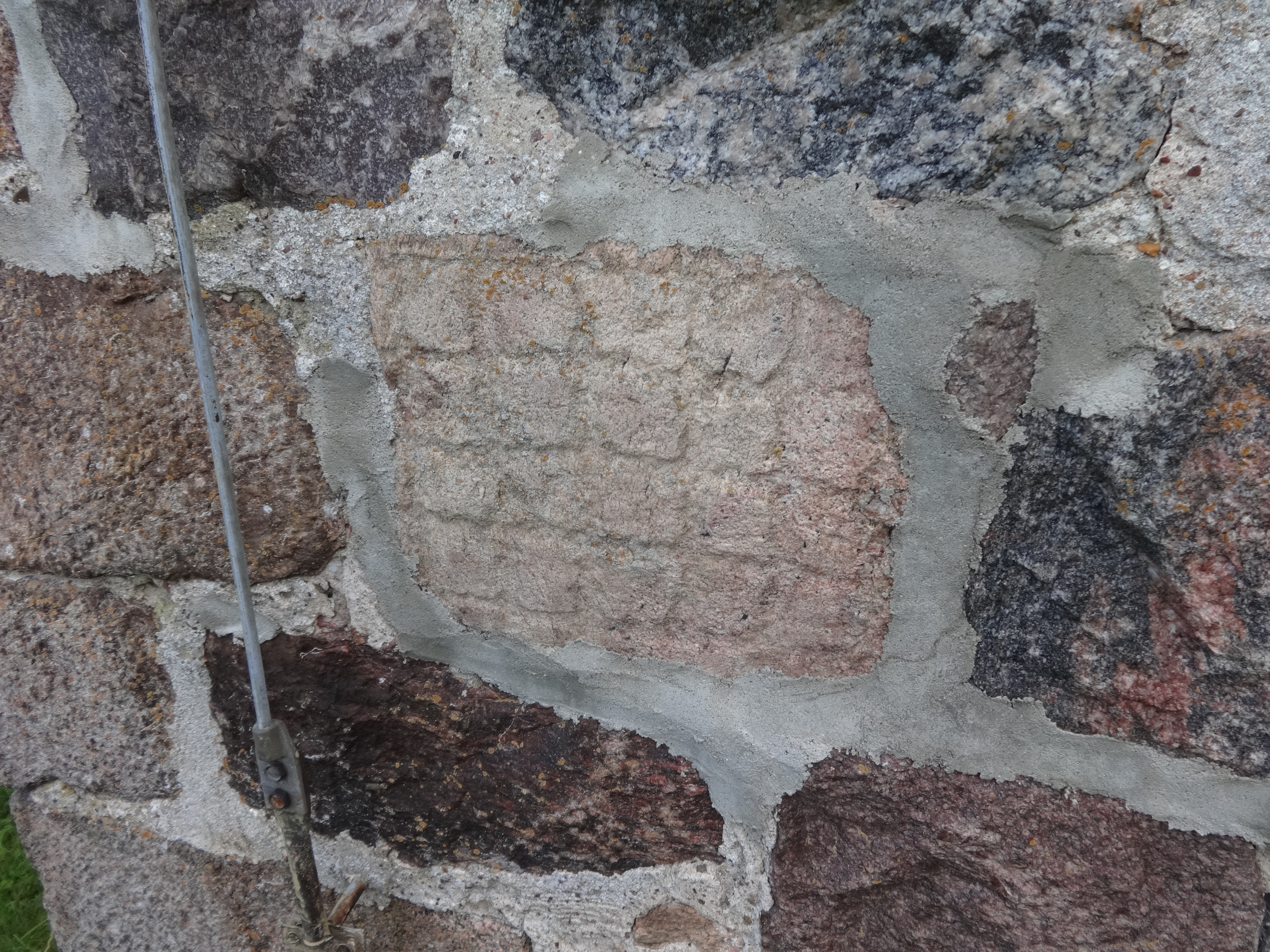 Die Dorfkirche in Gutengermendorf entstand in der Mitte des 13. Jahrhunderts aus Feldsteinen. 1899 wurde sie barock überformt. In ihrem Innern befindet sich unter anderem eine hölzerne Kanzel aus dem Jahr 1697.